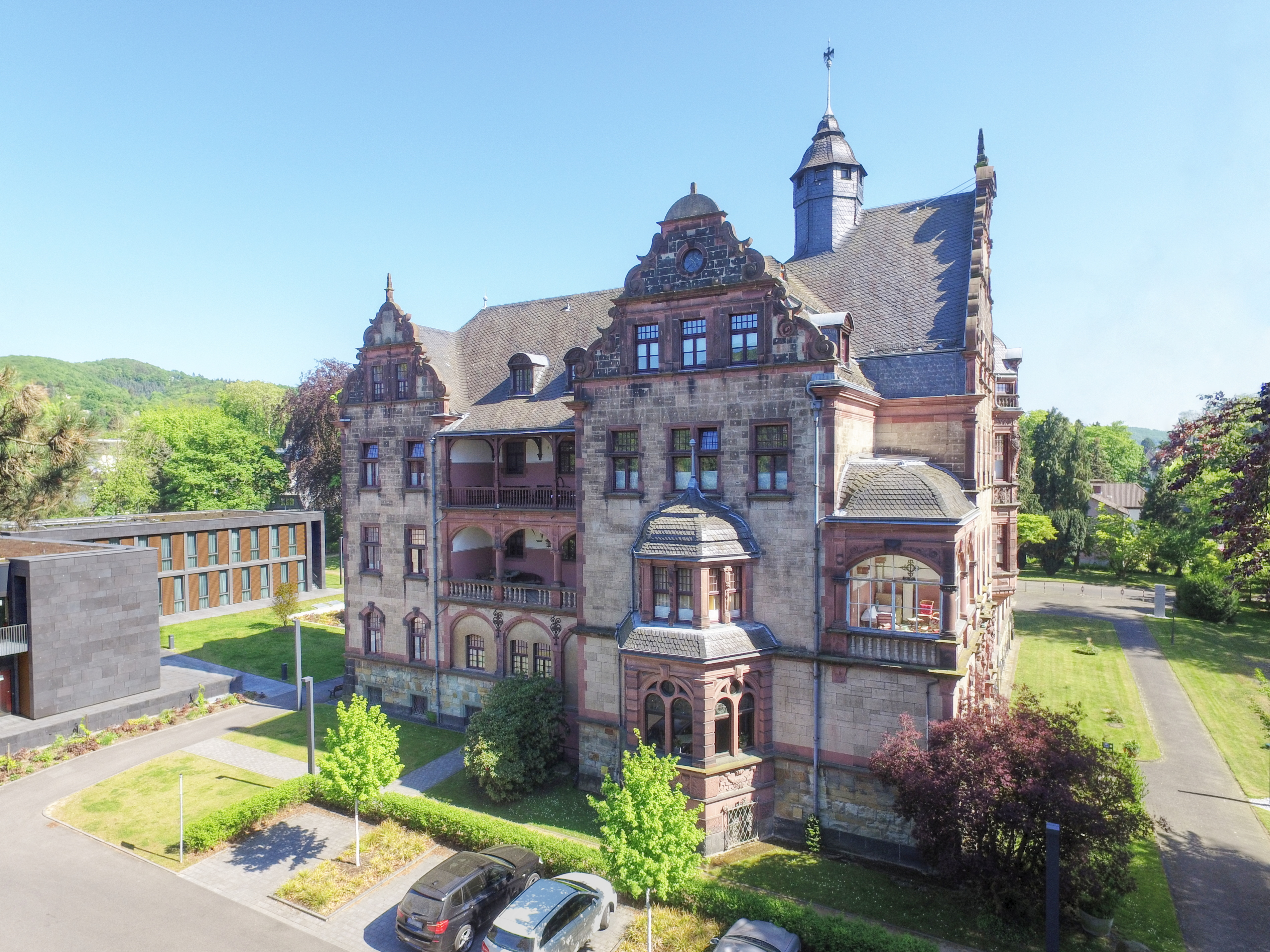 Hölterhoffstift (Nordseite) am Physikzentrum Bad Honnef mit Gästehaus (links)